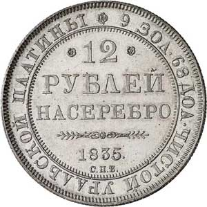 12 рублей 1835 СПБ Николай I